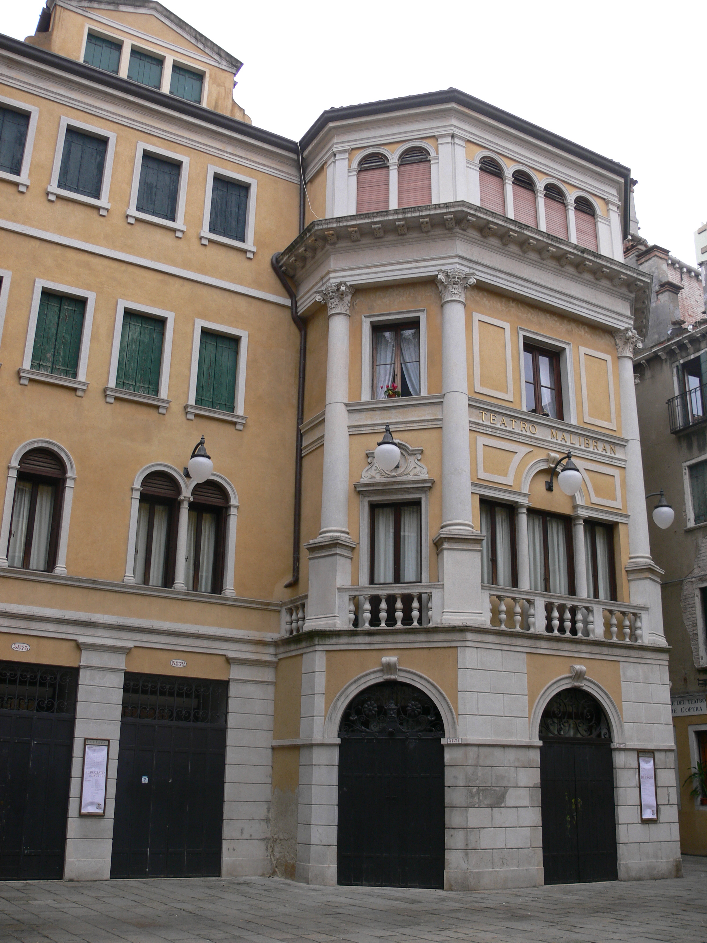 Teatro Malibran, Venezia, Italy